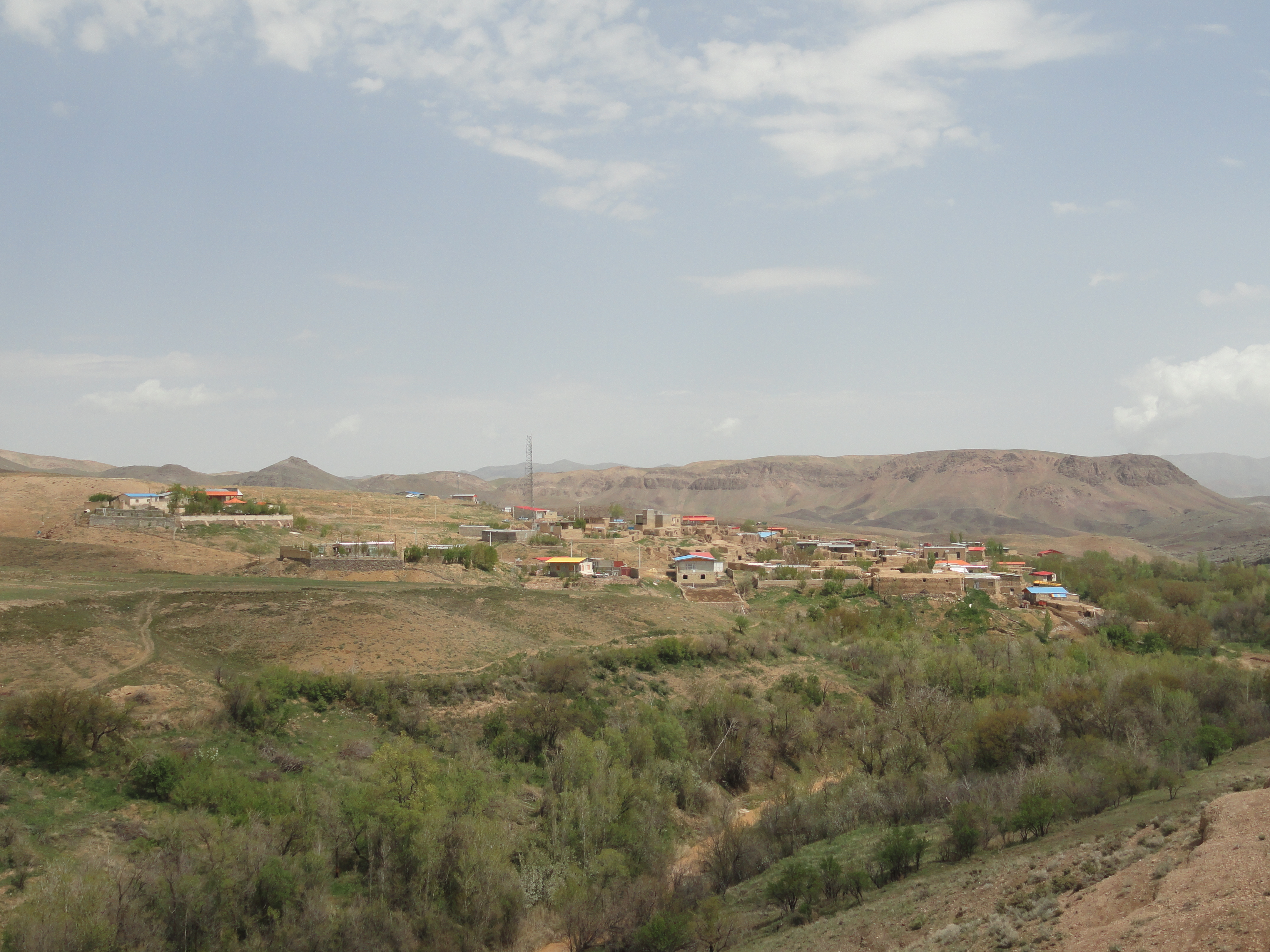 نمای از روستای نصرت آباد قاراداش